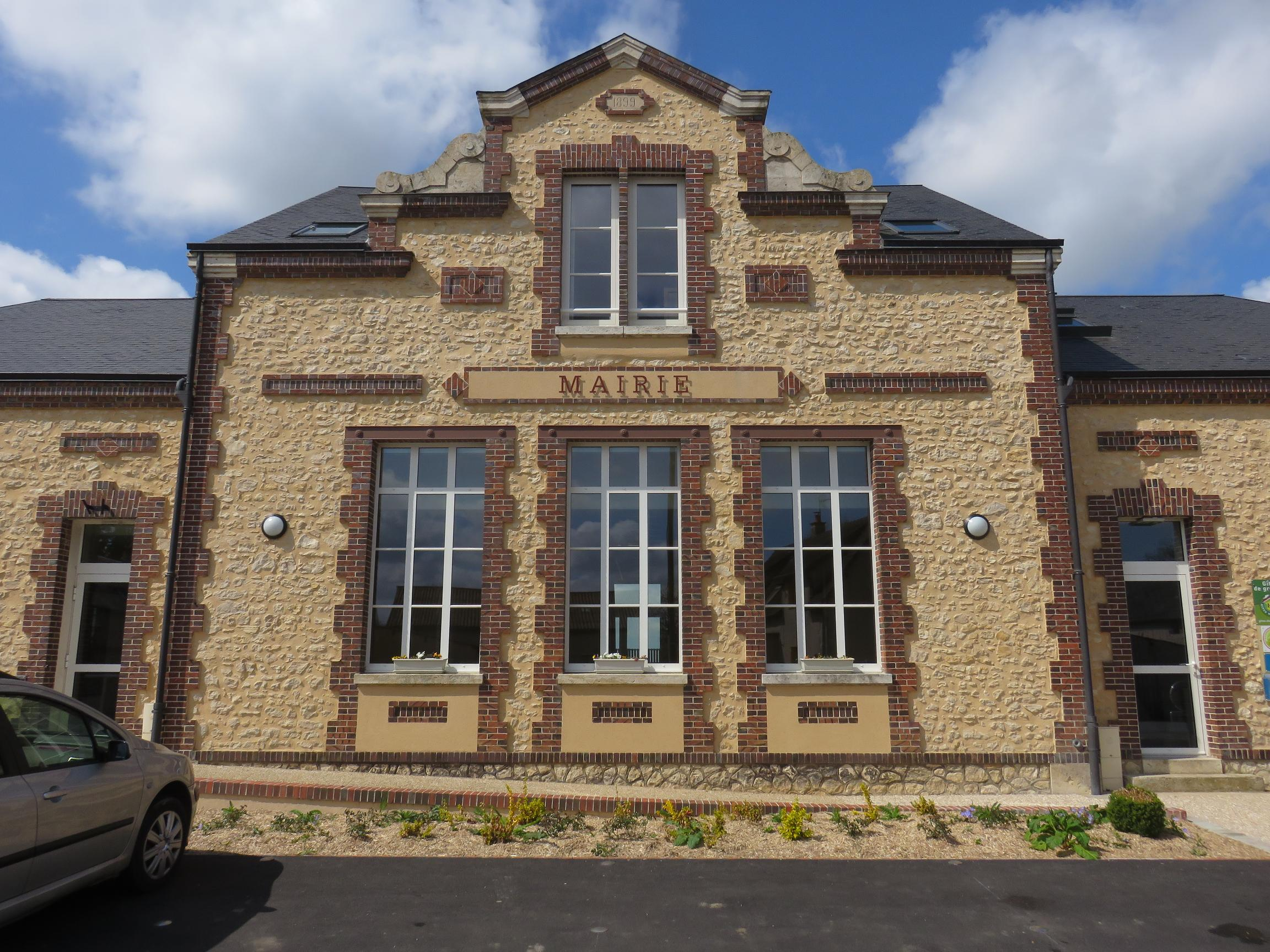 Village de Morier, Mairie